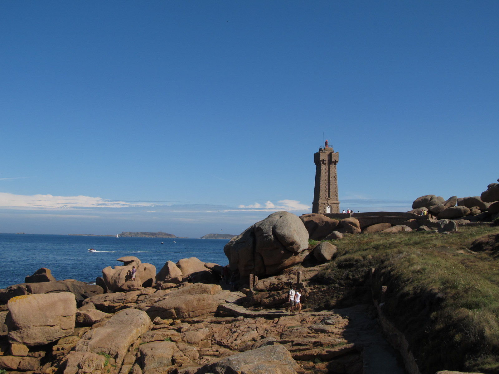 Ploumanac'h